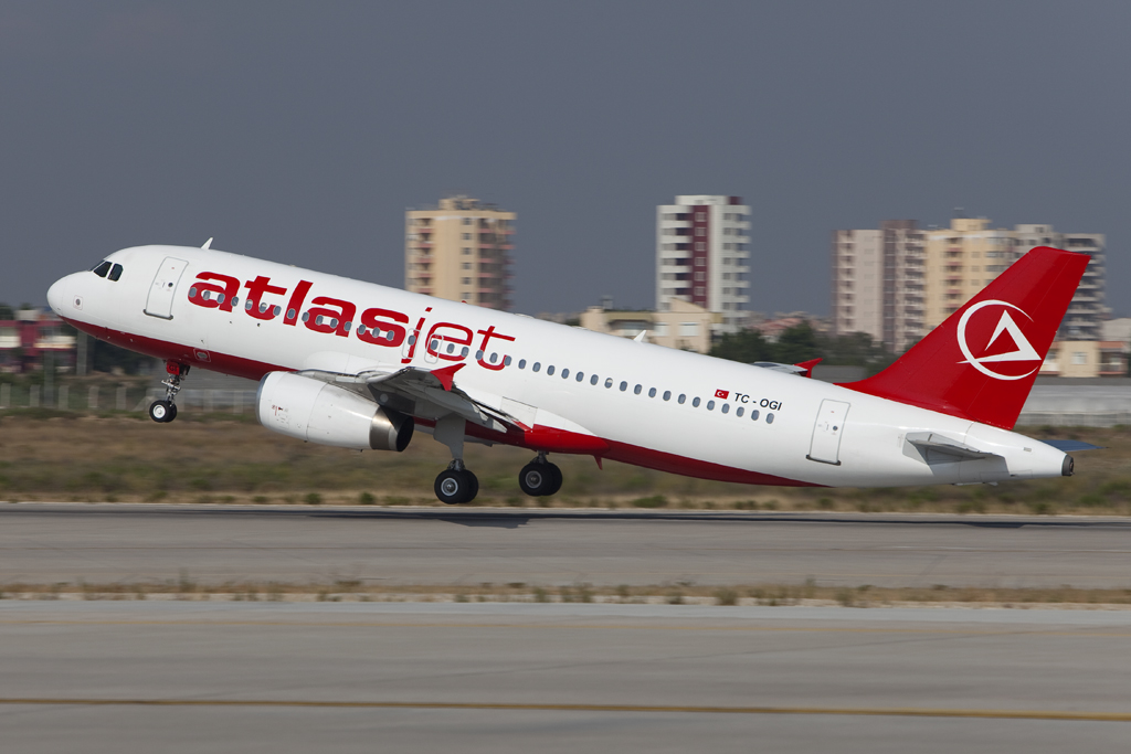 TC-OGI A320 Atlasjet